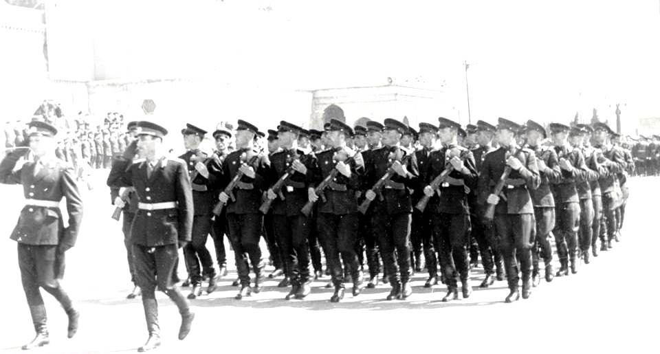 Парад 1960 г. 6 рота